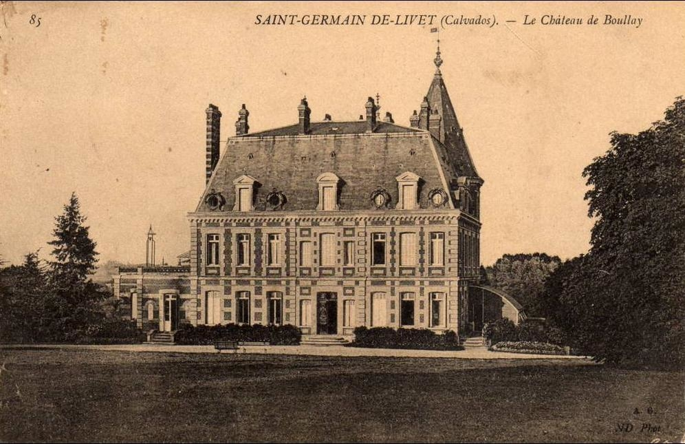 Saint-Germain-de-Livet, département du Calvados, sur une carte postale de la fin du 19e ou du début du 20e siècle. Vue du château du Boullay.